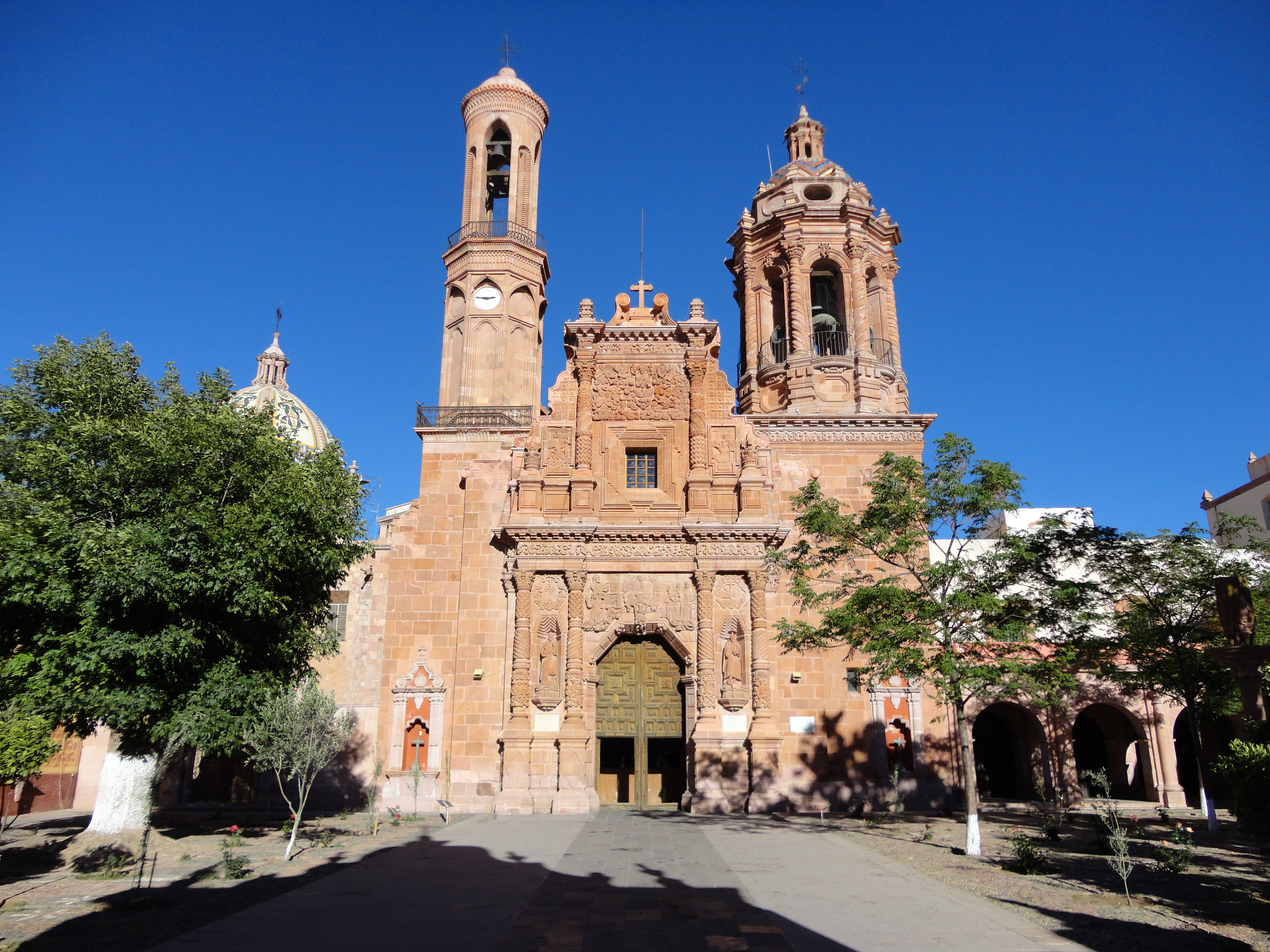 Fachada del antiguo Colegio de Propaganda Fide de Guadalupe, Zacatecas.